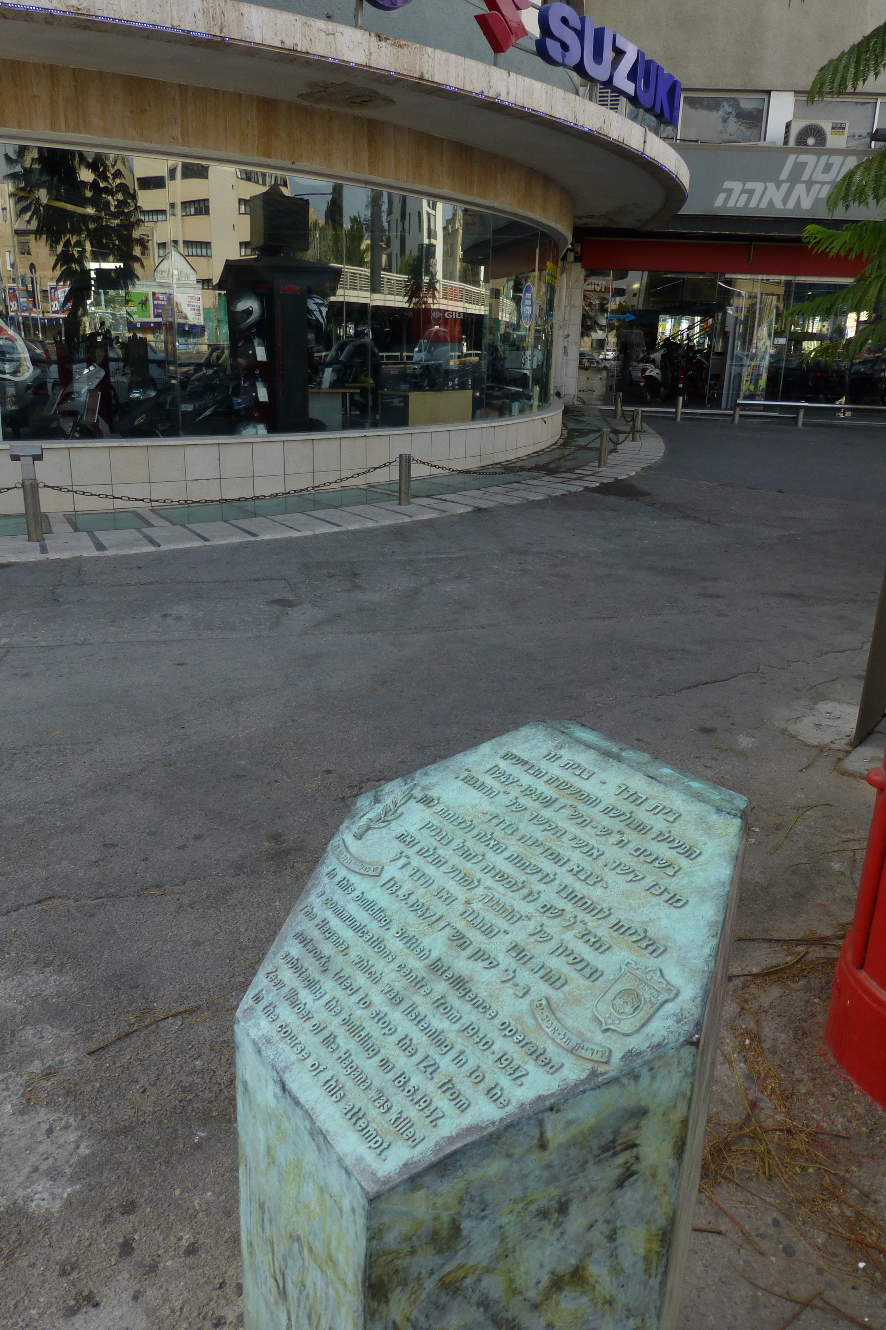 בית הדר הוא בניין המשרדים הראשון שנבנה בתל אביב. הבניין תוכנן ב-1934 על ידי האדריכל קרל רובין והוקם בין השנים 1936 ו-1938. מבנה זה הוא גם הבניין הראשון שנבנה כשלד פלדה, סוג בנייה נדיר יחסית בארץ.